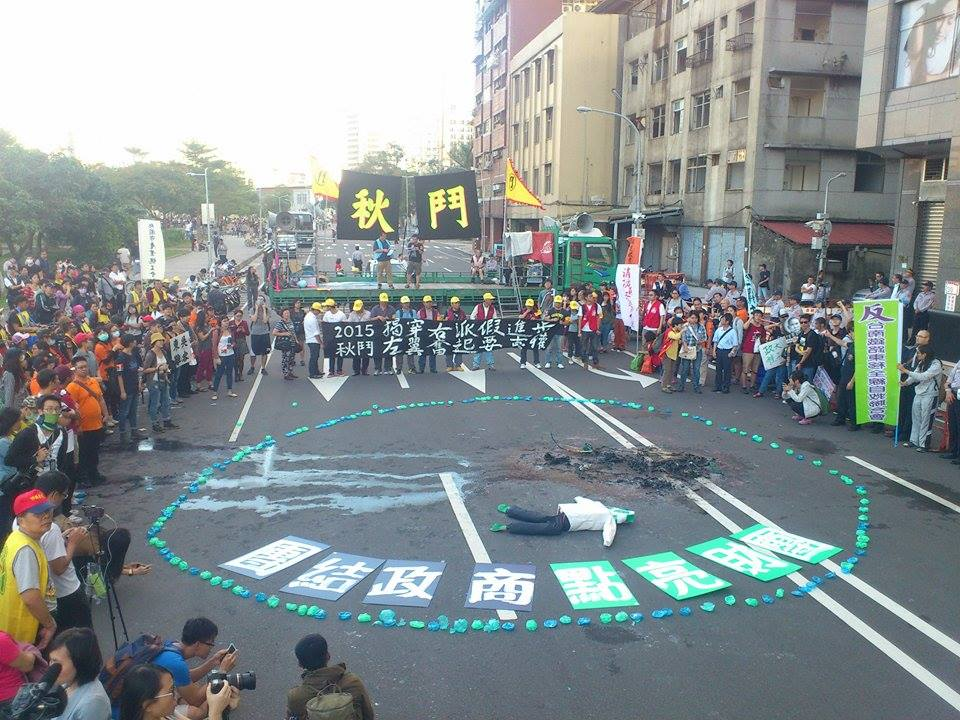 2015年秋鬥遊行終點：臺北市中正區北平東路匯泰大樓，民主進步黨總統候選人蔡英文全國競選總部大門前。地上的抗議標語「團結政商，點亮財團」，是諷刺蔡英文的競選口號「點亮台灣」。在遊行結束前的最高潮，秋鬥安排四大戰線的代表同舉火炬將一路被當神轎扛著的藍綠小豬當街焚毀，同時號召遊行群眾當場踩扁上百隻小豬撲滿。踩扁的小豬撲滿在藍綠小豬灰燼四周圍成一個大圓圈，諷刺蔡英文的小額募款行動與選戰主視覺「點亮台灣」之設計。